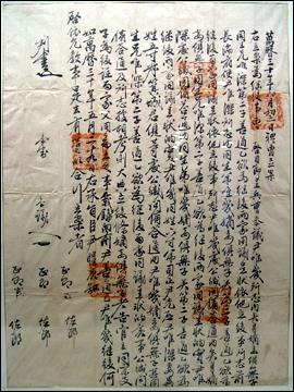 조선시대 후기의 문신 고산 윤선도의 입양 문서, 윤선도의 8세 때 생부 윤유심의 아들에서 백부 윤유기의 양자로 입양되는 문서이다